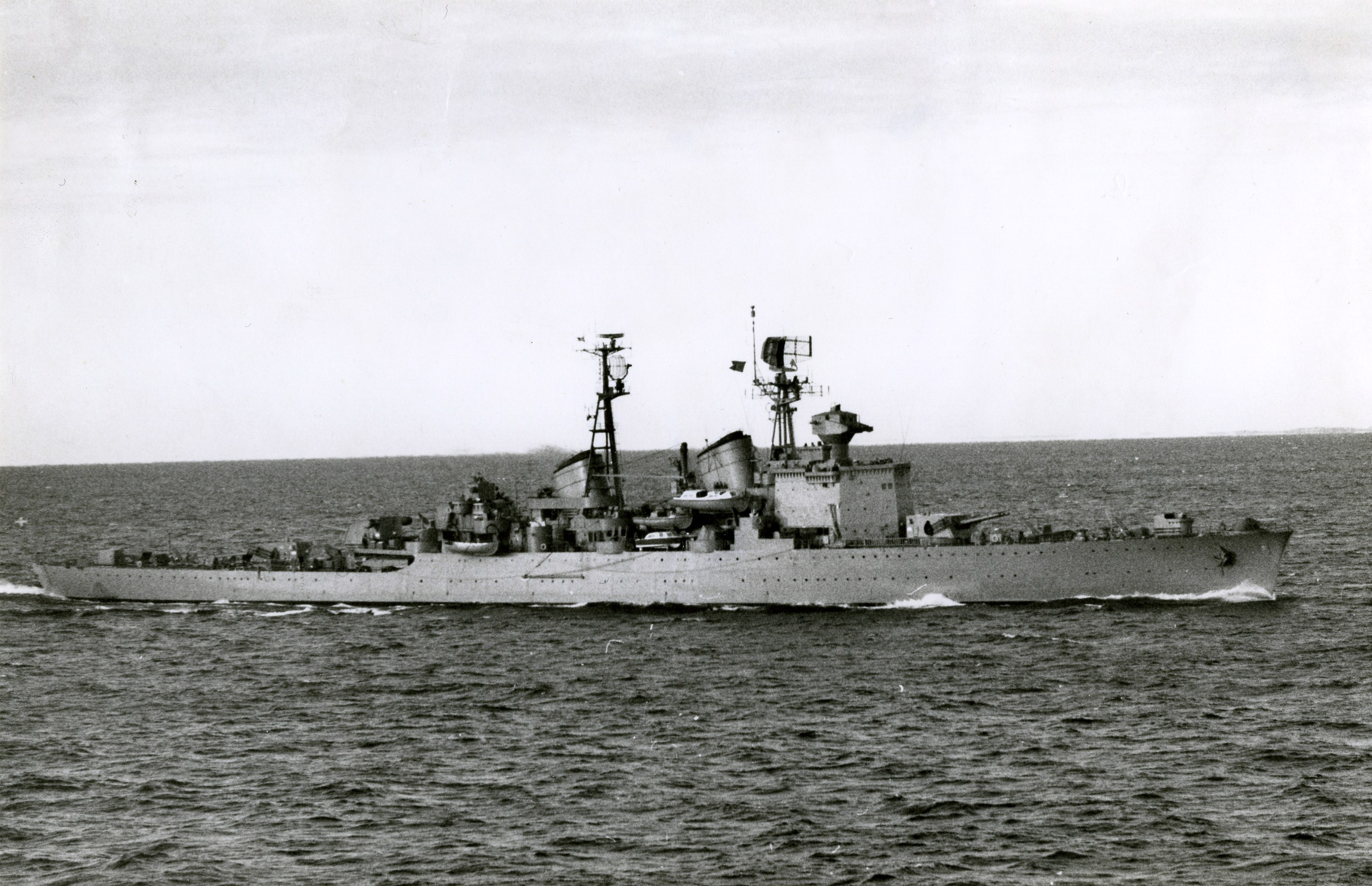 Kryssaren av Tre Kronor-klass, HMS Göta Lejon, under gång år 1958.